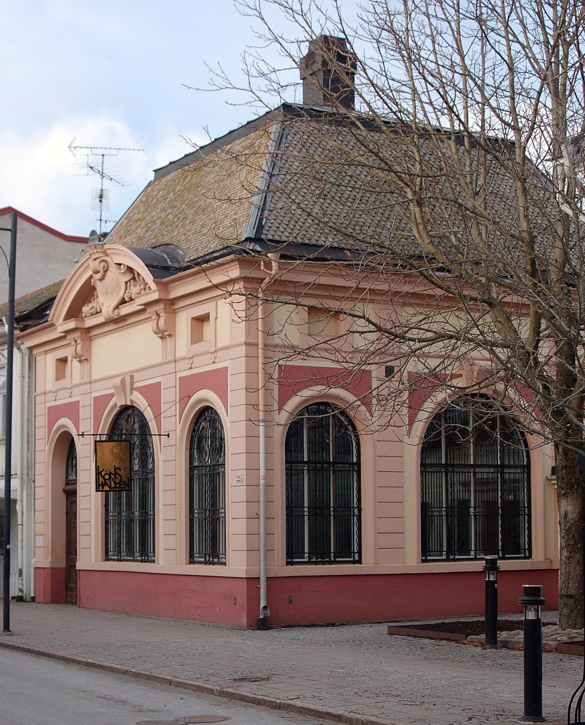 Arvika Konsthall.